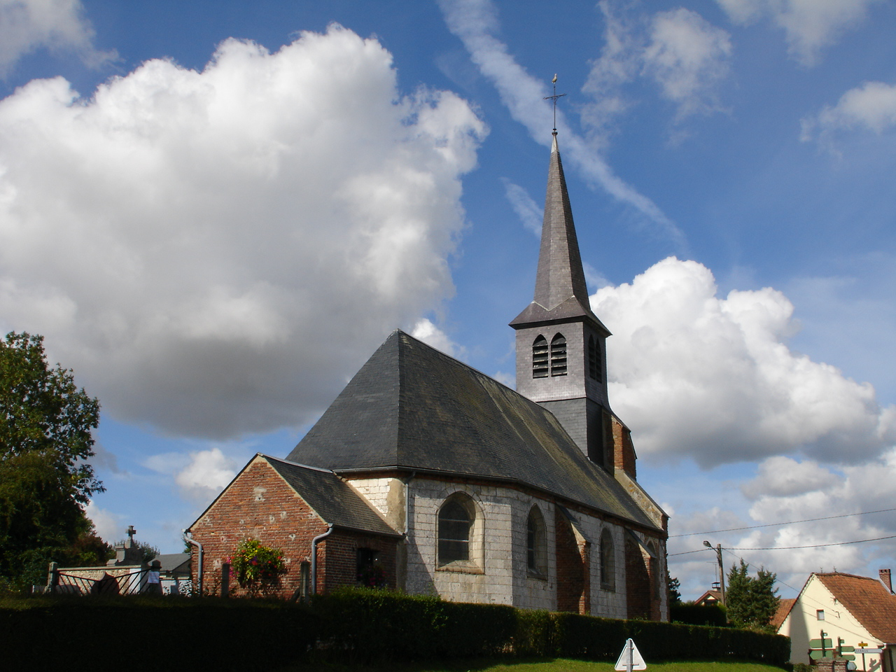 Église de Campigneulles-les-Petites